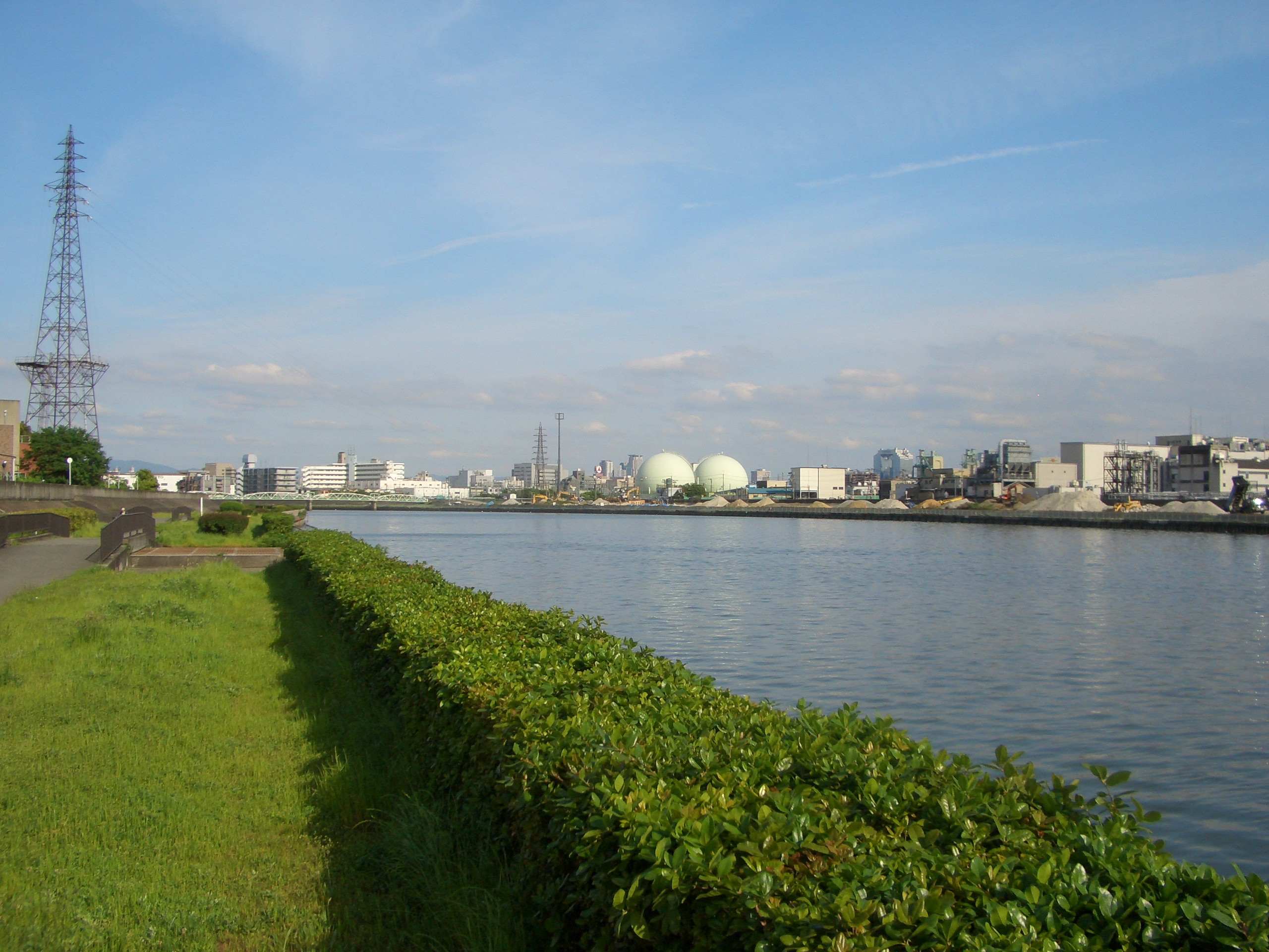 神崎川。kanzaki river。